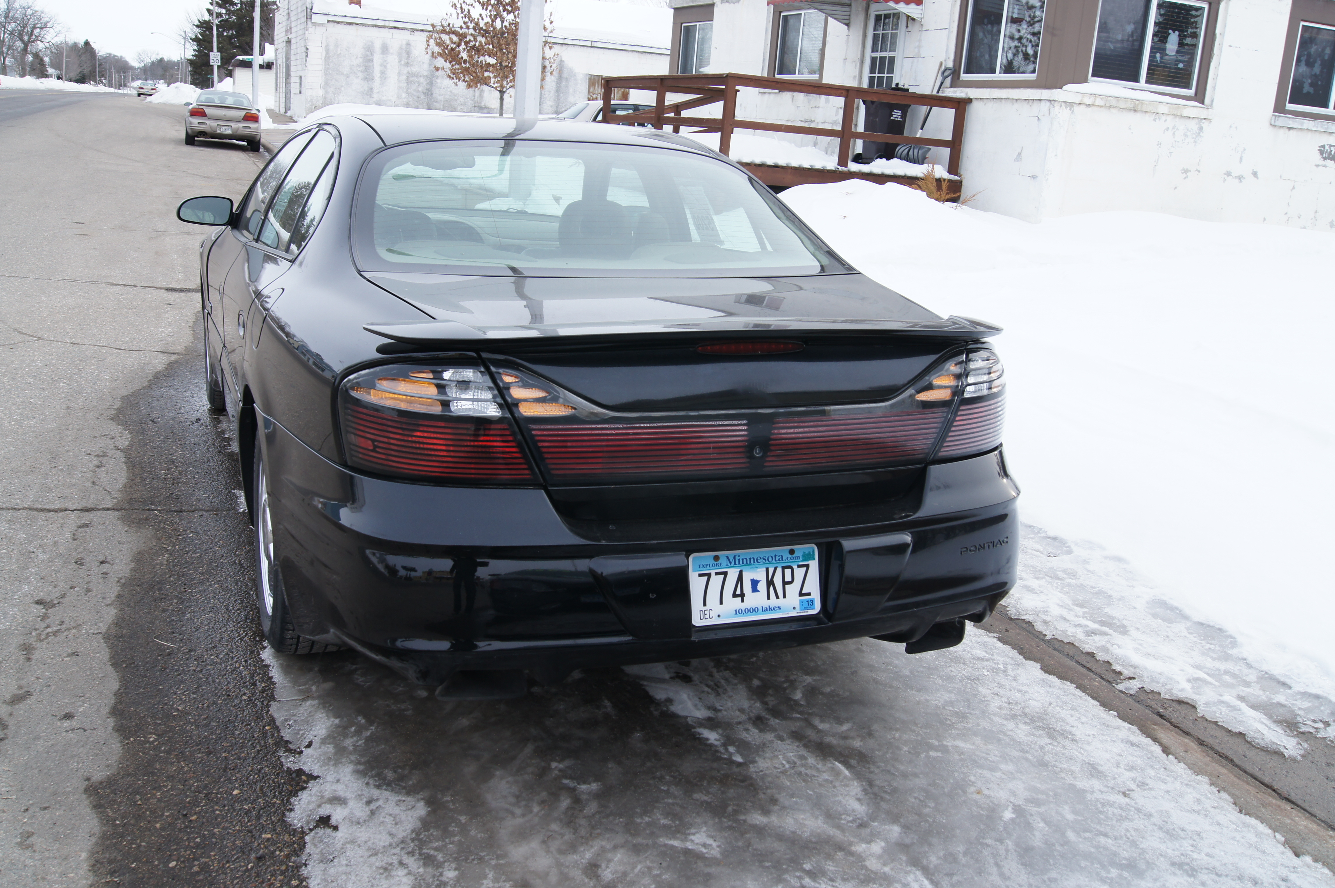 00 Pontiac Bonneville SSEi